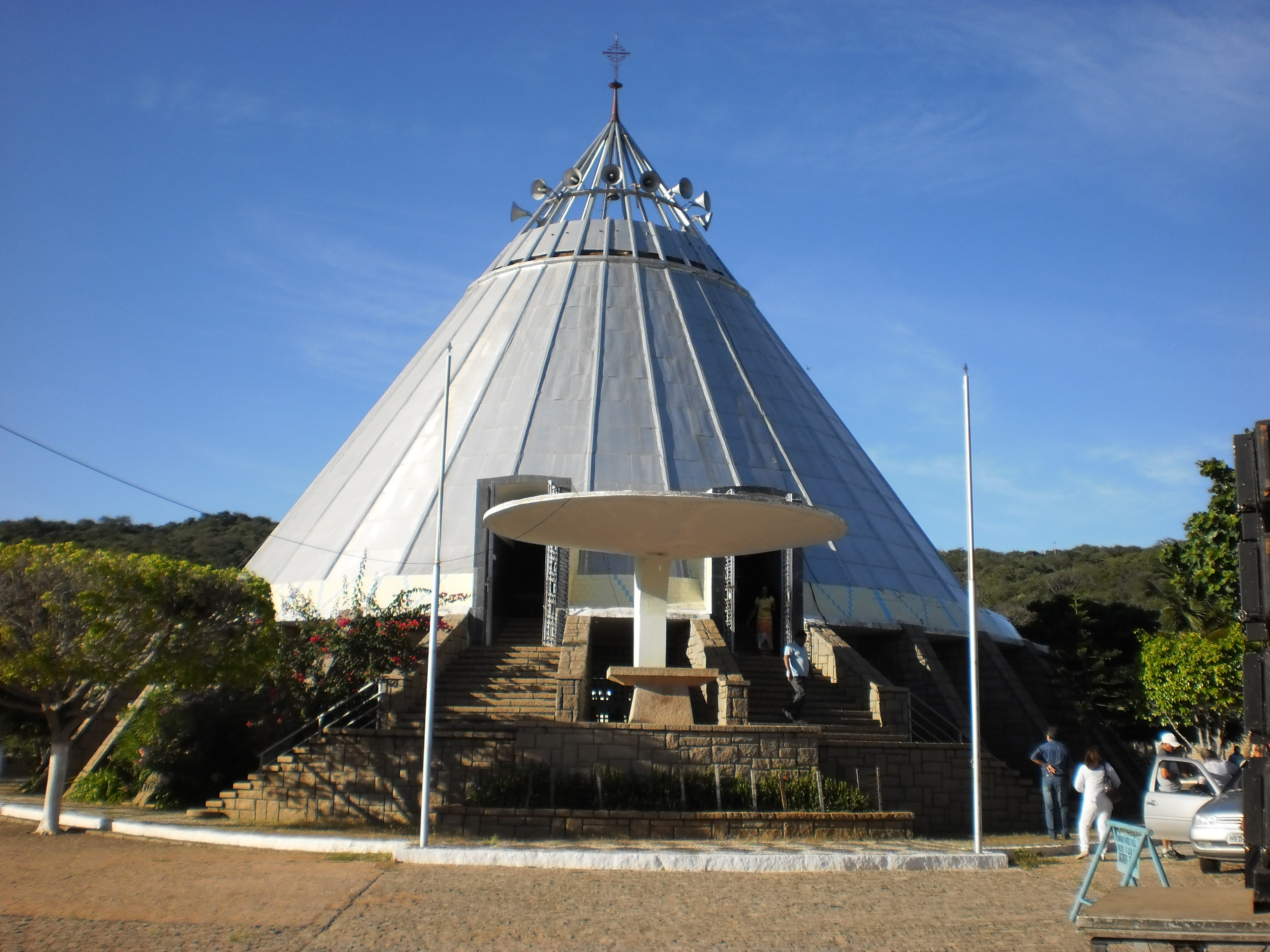 Santuário do Lima em Patu, Rio Grande do Norte, Brasil